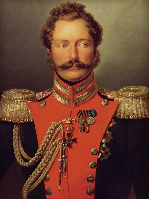 Michael, Großfürst von Russland